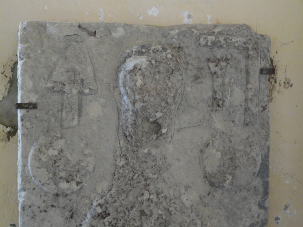 pierre tombale 11ème siècle? dans l'église de Blanot